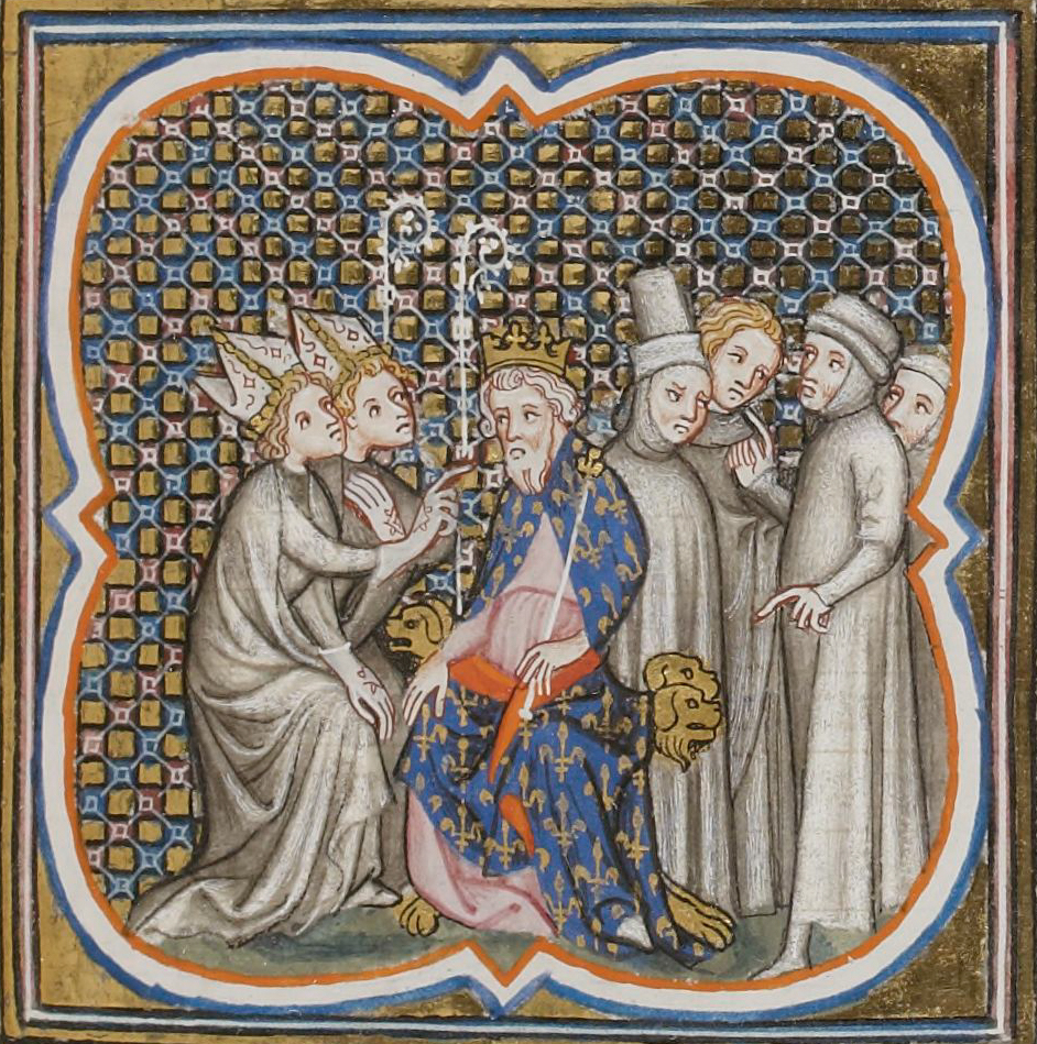 Louis the Pious and envoys. fol. 139r (60 x 65 mm) Grandes Chroniques de France (BNF, FR 2813)